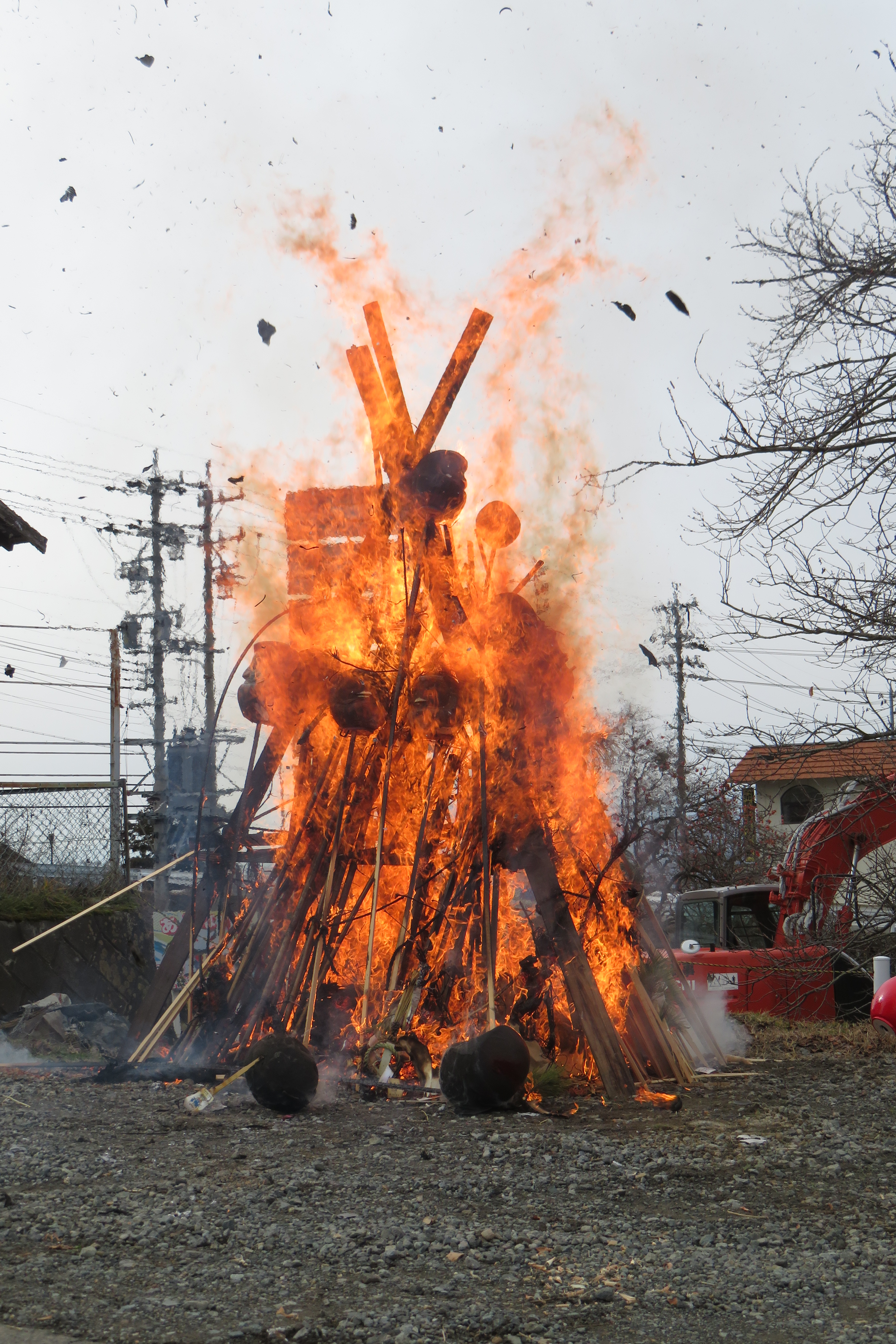 毎年、八ヶ郷用水取入れ口にある夜間瀬川水防小屋横で一本木・栗和田・竹原地区の有志によりドンドン焼き行われています。ここは農林水産省の疏水百選・八ヶ郷用水（長野県）で「八ヶ郷用水」水土里の路ウォーキングコースとして紹介されています・